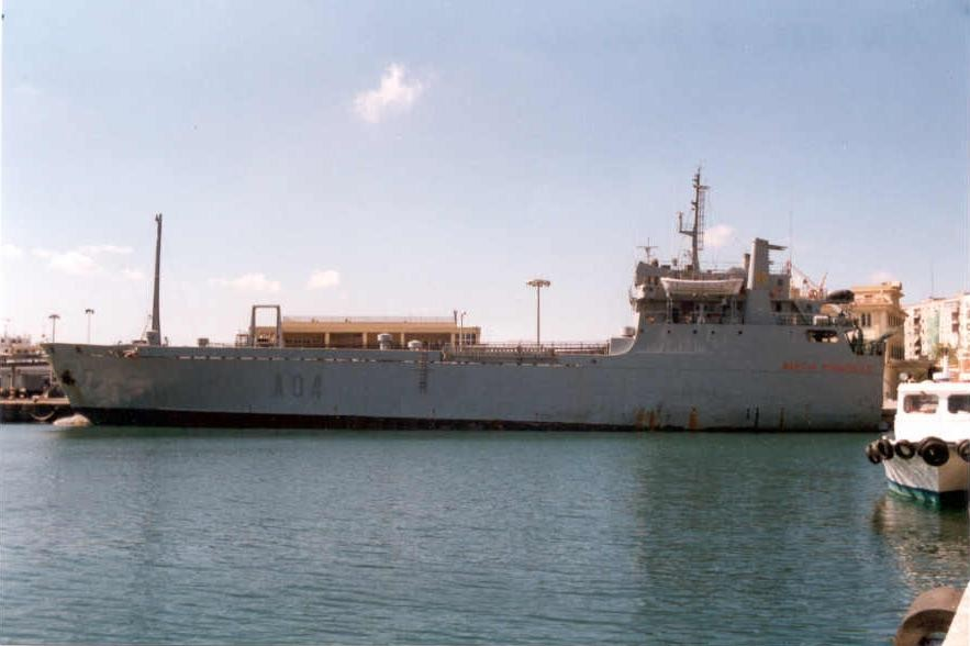 Buque de transporte de la Armada Española Martín Posadillo (A-04)